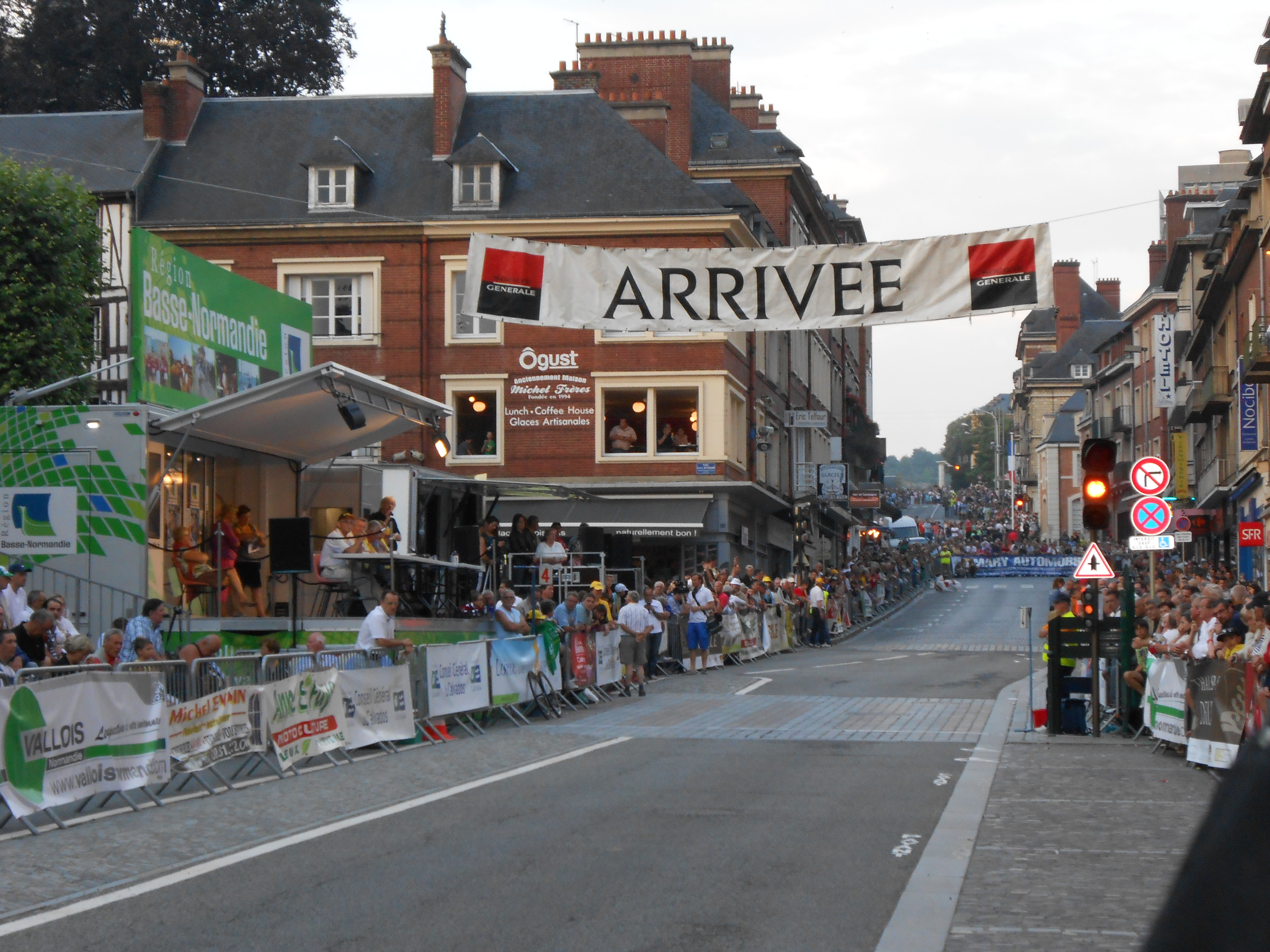 Ligne Départ/Arrivée du Critérium de Lisieux située rue Henry Chéron.